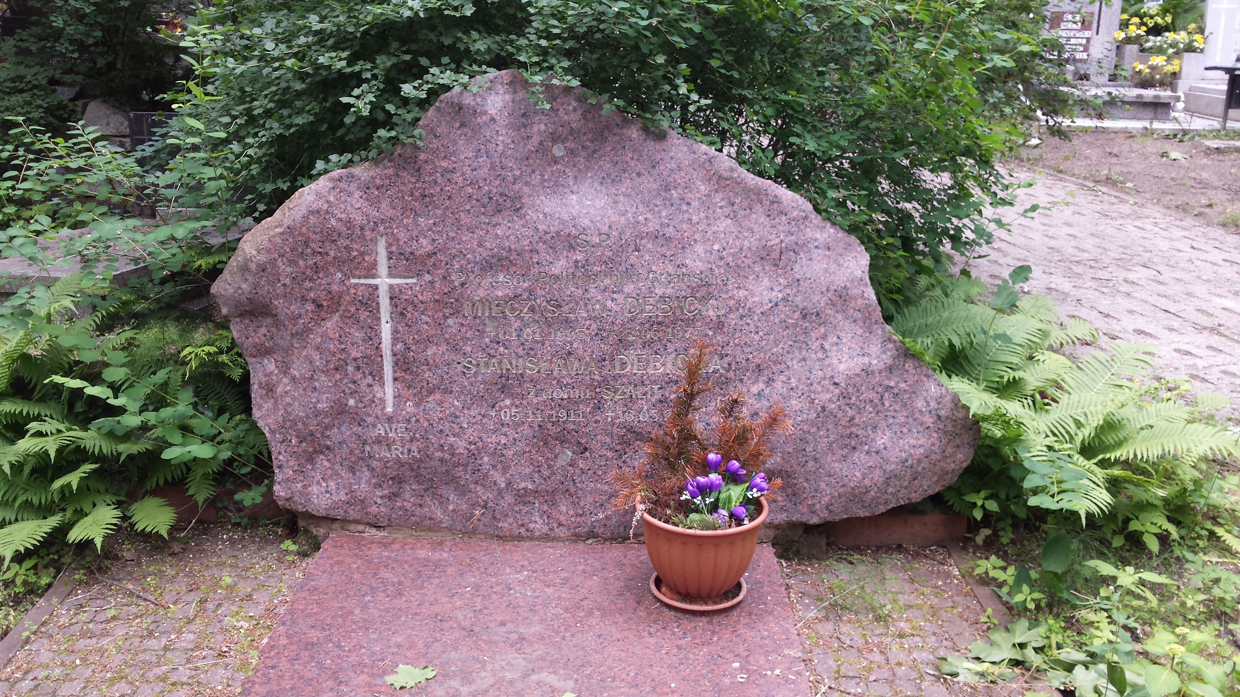 Grób prof. Mieczysława Dębickiego (1905-1977) na Cmentarzu Srebrzysko w Gdańsku.